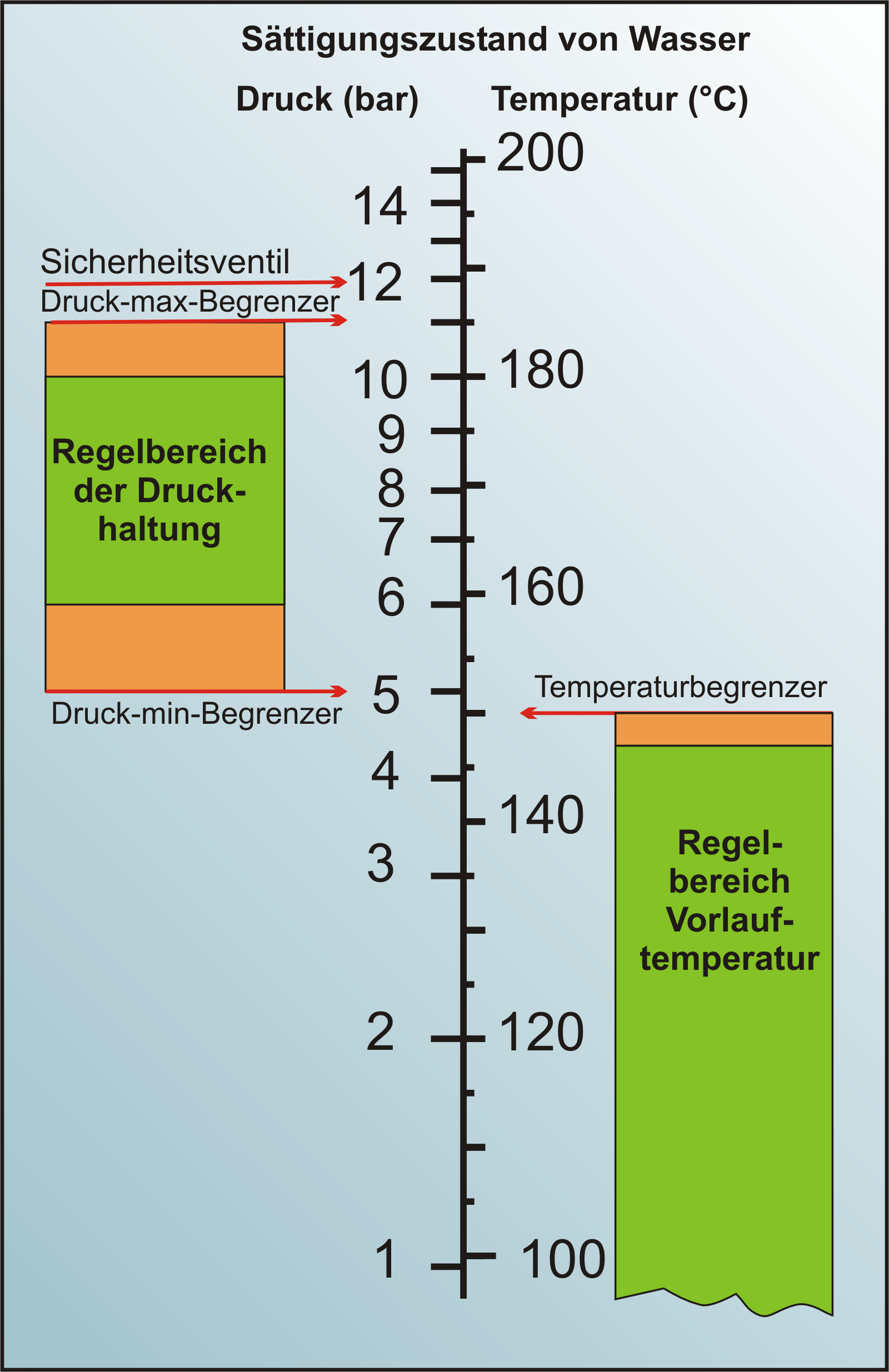 Arbeits- und Regelbereich einer Heißwasserkesselanlage mit Druck- und Temperaturabsicherung